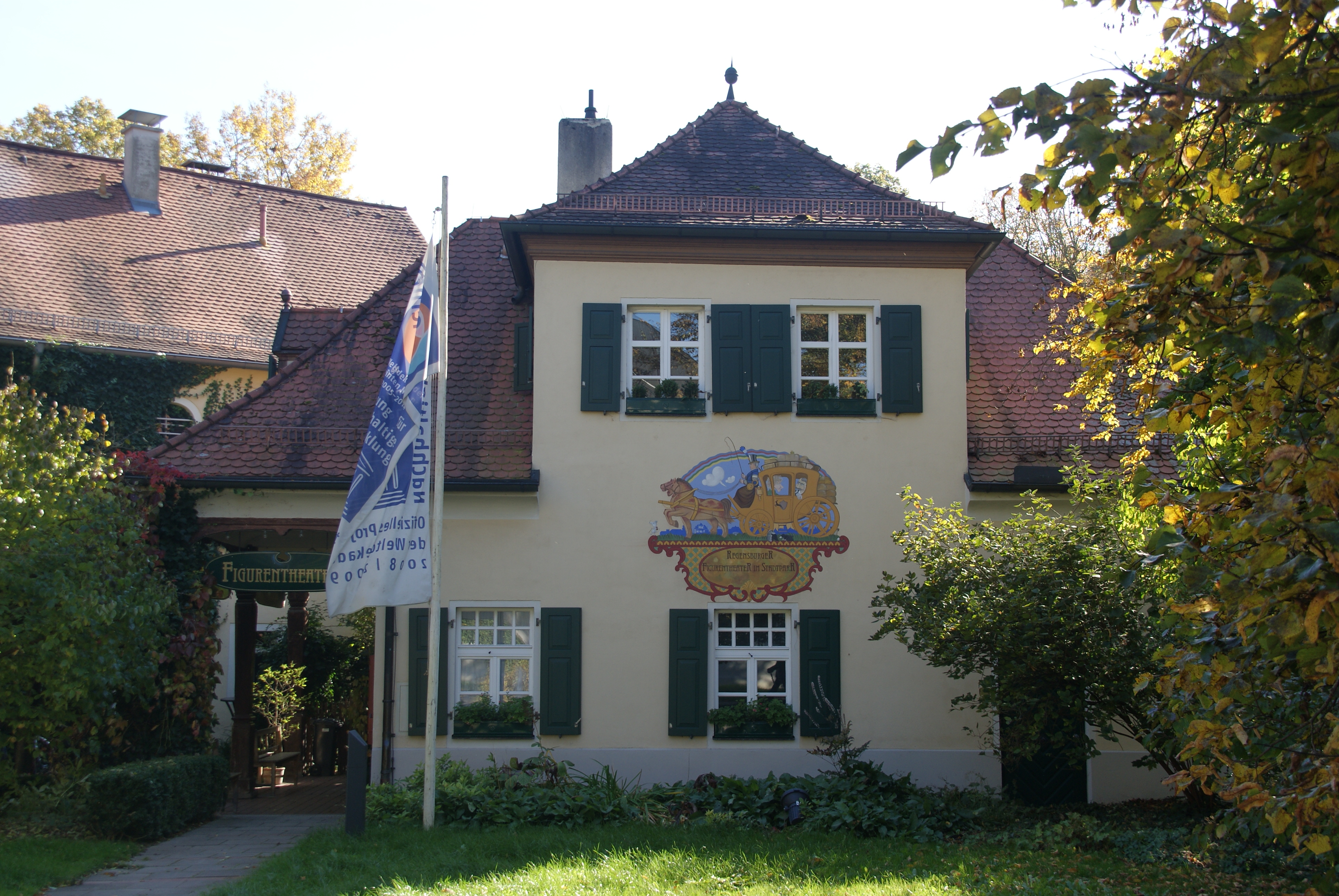 Figurentheater im Stadtpark Regensburg This is a photograph of an architectural monument.